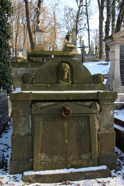 Гробниця родини Пілатів.Личаківський цвинтар , поле № 14.